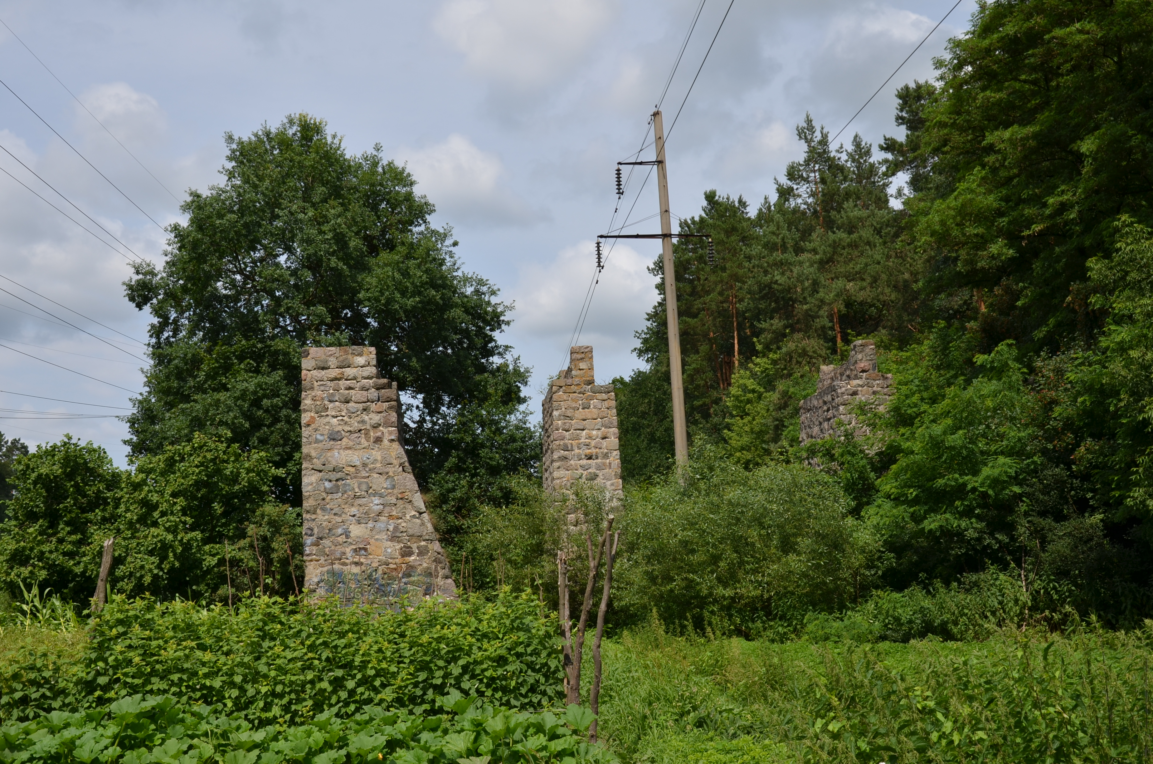 Чернечий ліс, Києво-Святошинський район